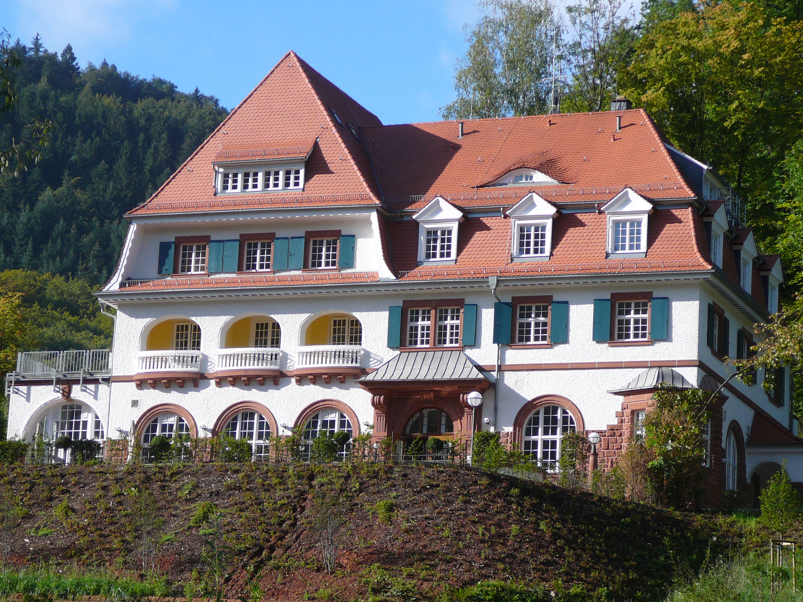 Kurhaus Trifels in Bindersbach (Ortsteil von Annweiler, Rheinland-Pfalz)